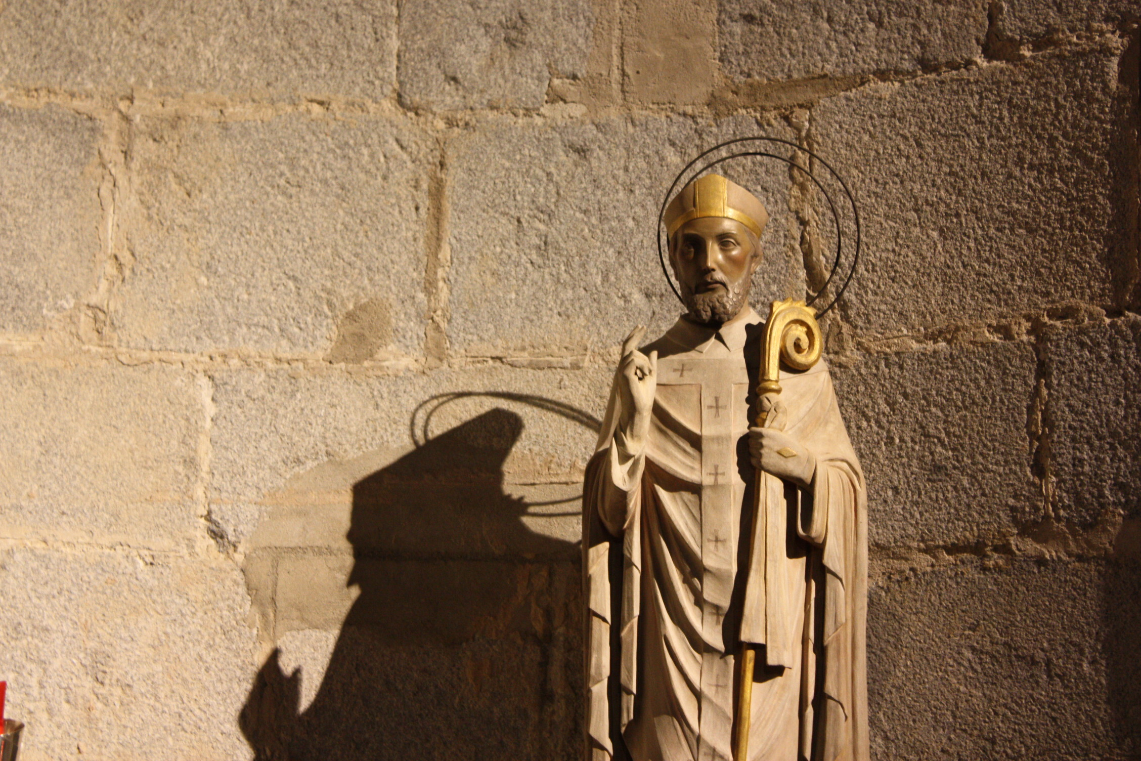 Talla de Sant Ot a la Catedral d'Urgell